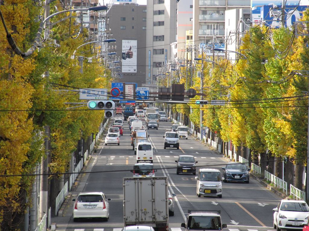 東京都府中市 Fuchu-city, Tokyo